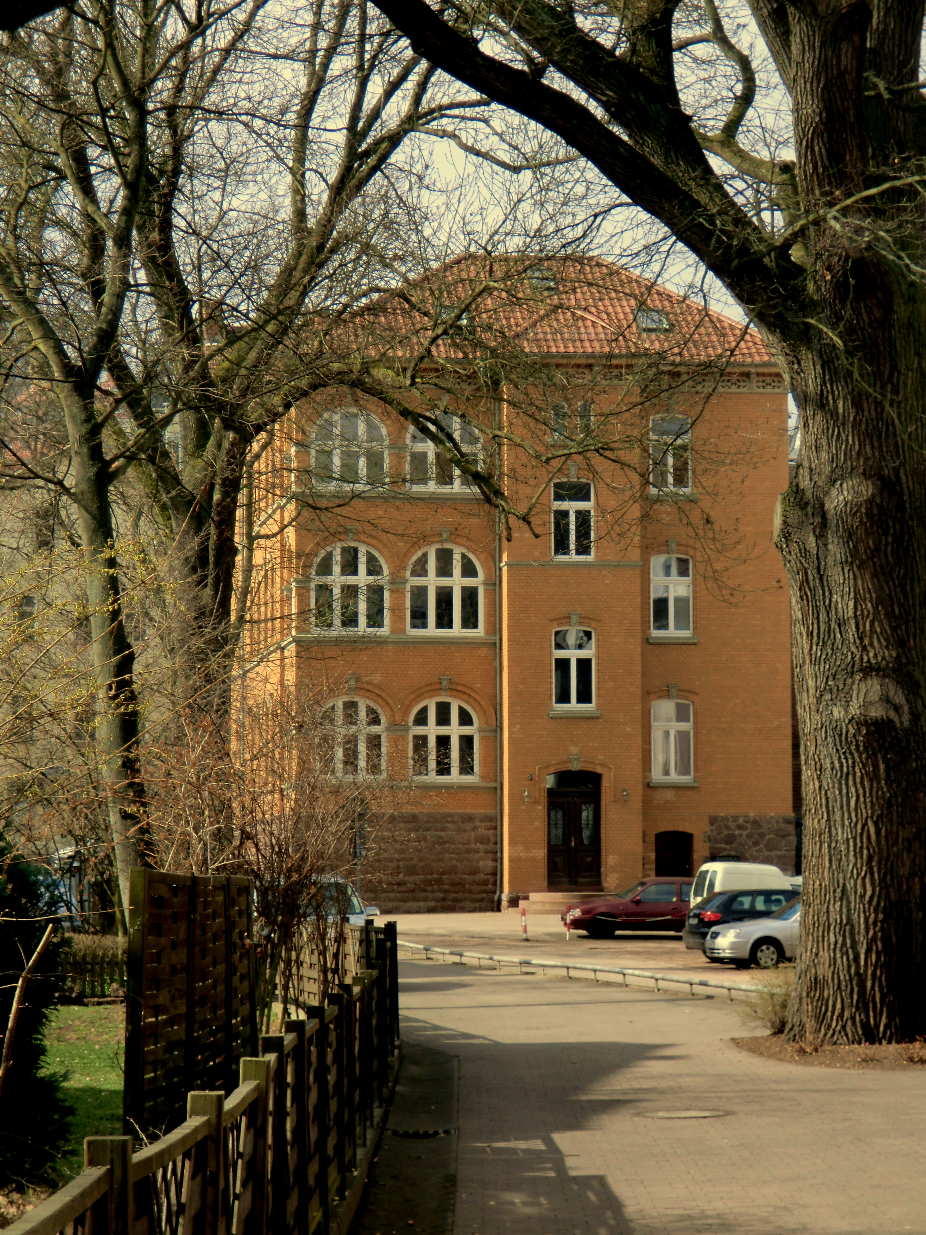 Das Haus Marienstraße 21 in Eisenach von Osten. Die Hausbeschreibung befindet sich in der Category:Haus Marienstraße 21, Eisenach